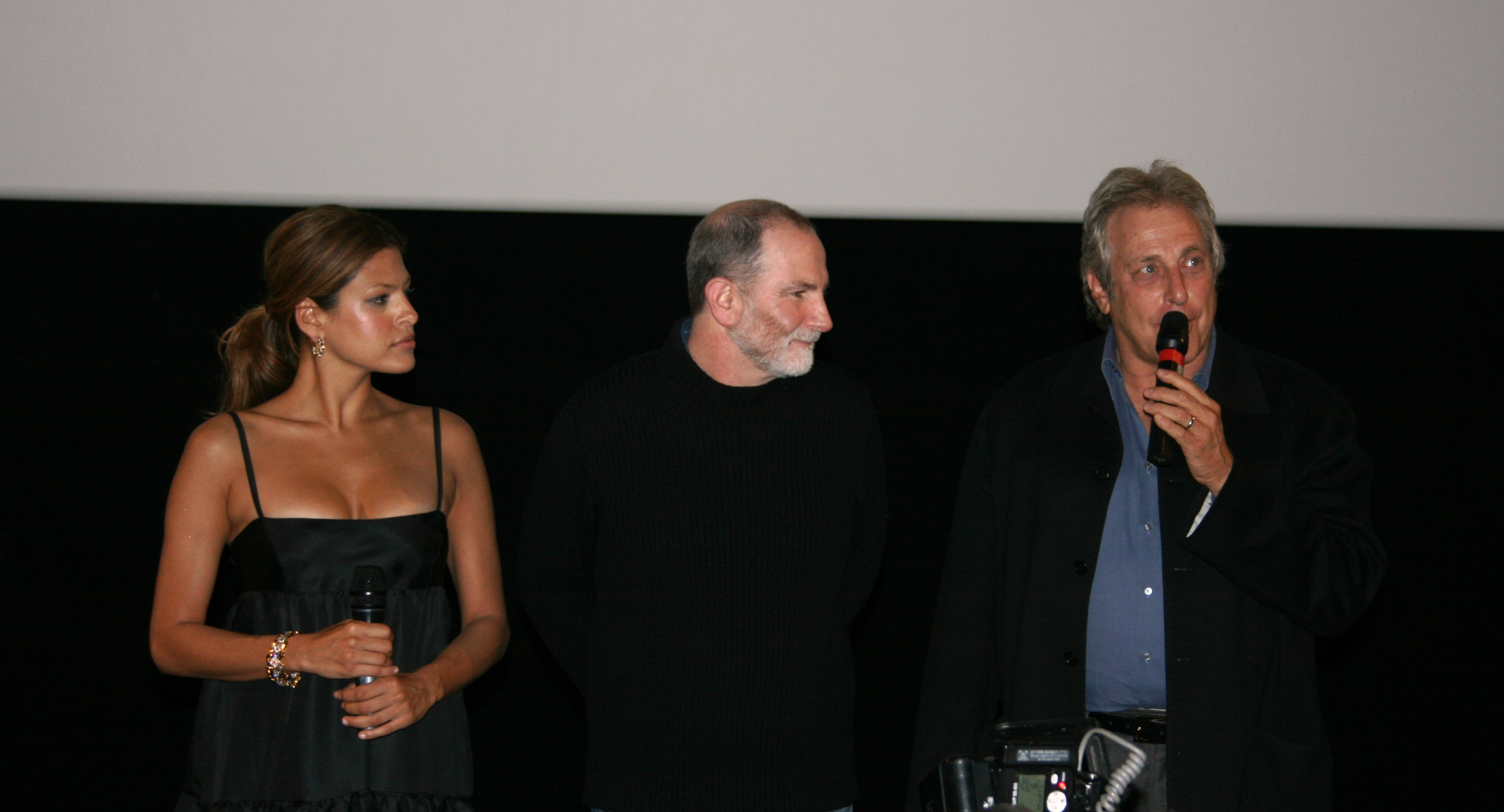 Eva Mendes, Bill Guttentag et Charles Roven à l'avant-première de Live ! diffusée à l'UGC Ciné Cité Les Halles, à Paris.